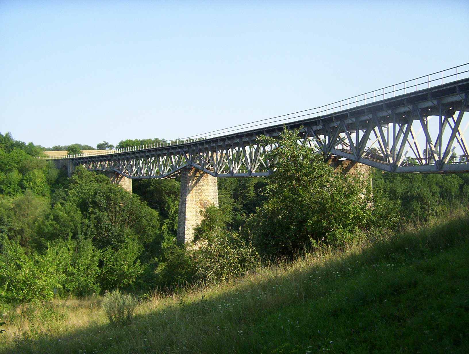 Železničný viadukt nad Žaboškrekmi na Myjave